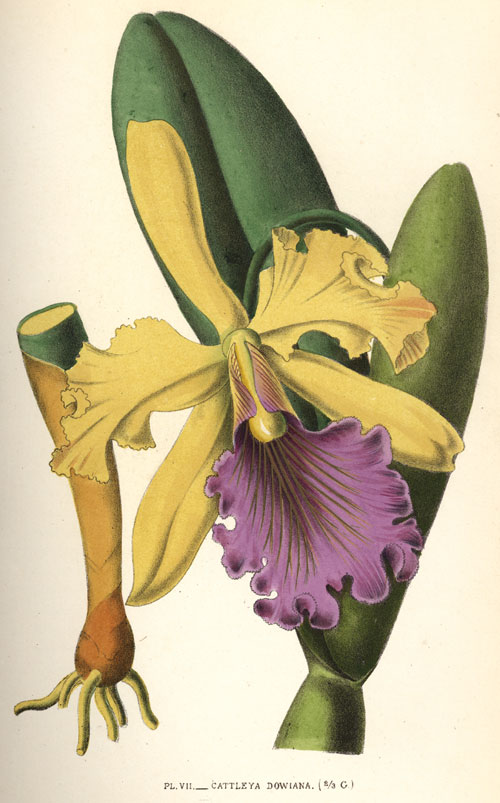 Cattleya dowiana From: Emile de Puydt: Les orchidées. Histoire iconographique. Organographie - Classification - Geographie - Collections commerce - Emploi - Culture avec une revue descriptive des especes cultivées en Europe Paris, J. Rothschild, 1880.